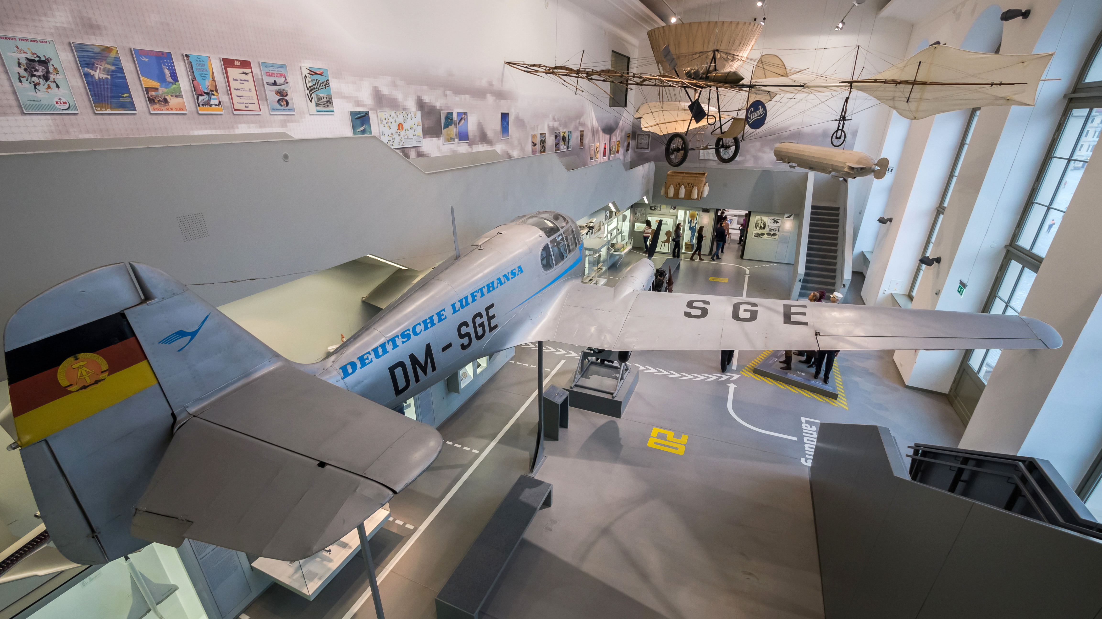 Verkehrsmuseum Dresden Ausstellungsräume Luftfahrt LII